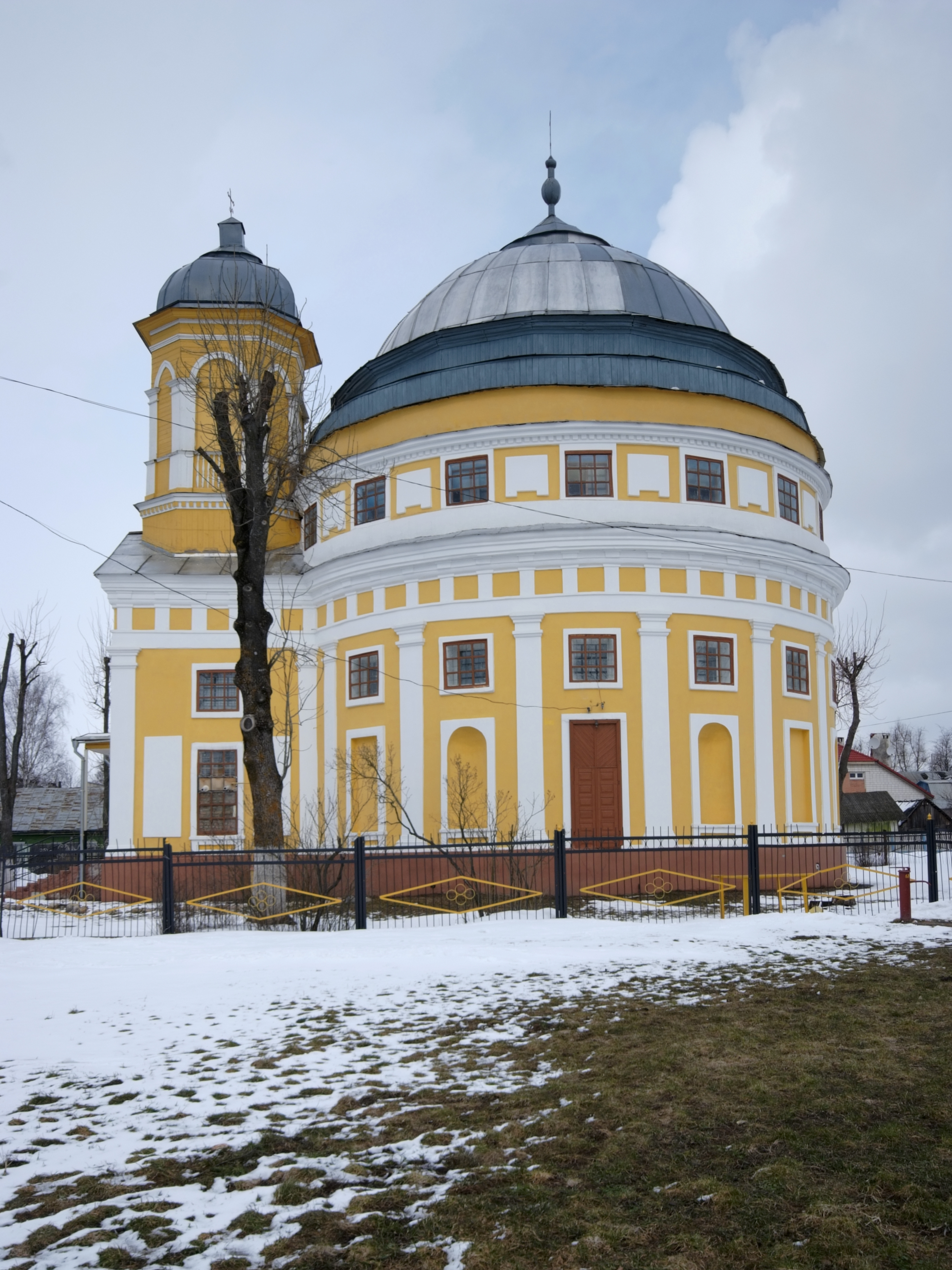 Беларуская (тарашкевіца): Праабражэнская царква. г. Чачэрск This is a photo of Belarusian heritage monument. Reference number: 311Г000808 ( WLM)